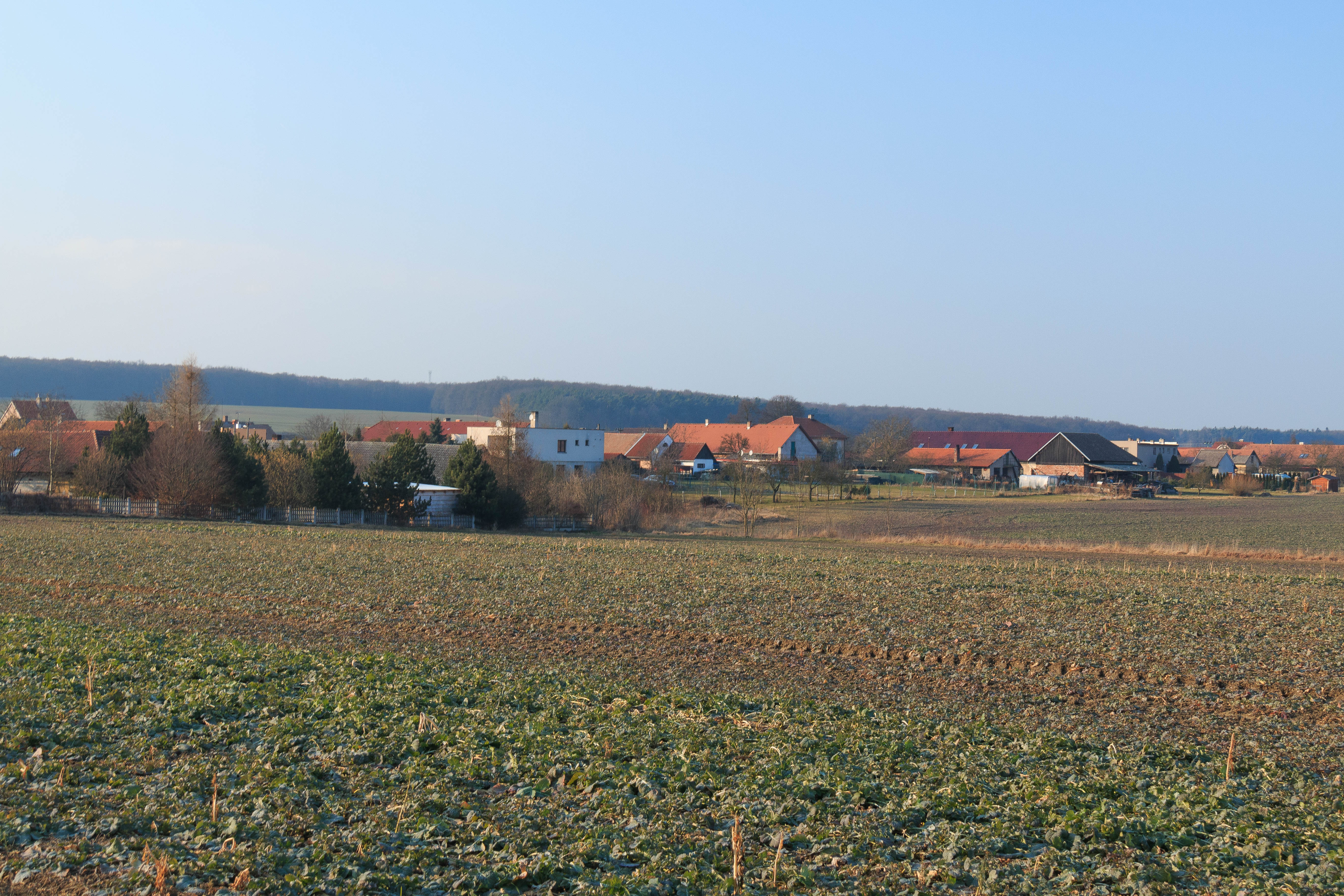 Pohled na Sopřeč